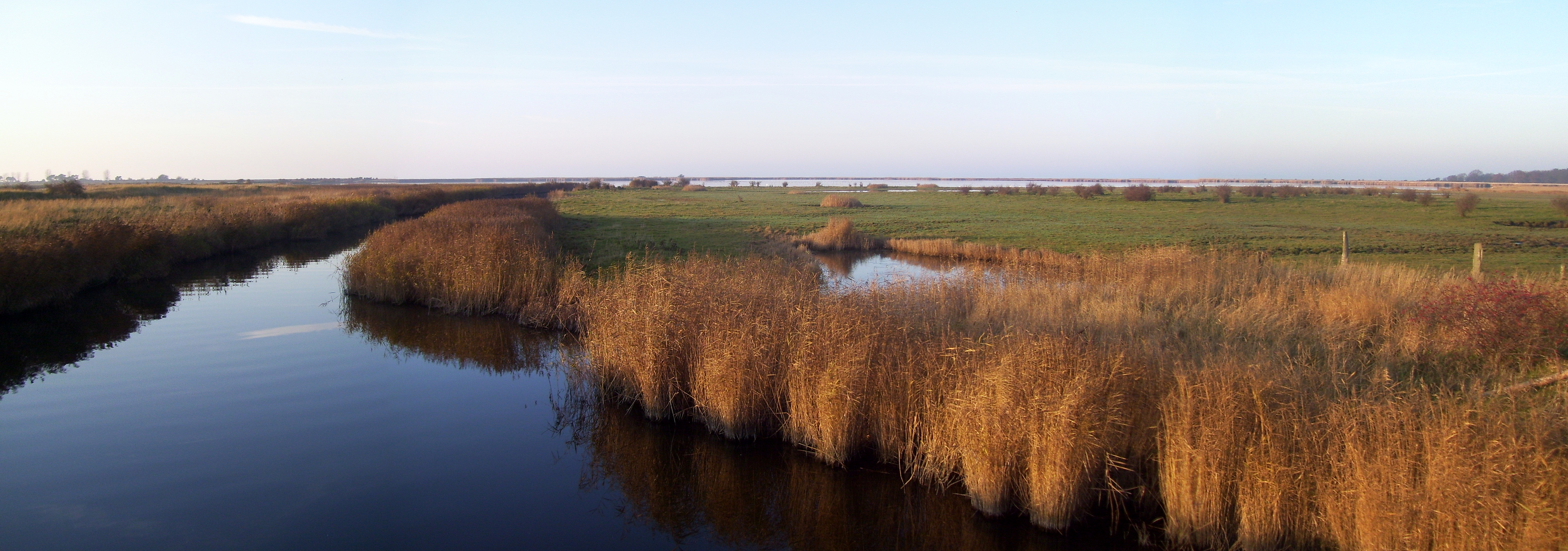 Lubmin, Halbinsel Struck, Graben zum Freesendorfer See (im Hintergrund)